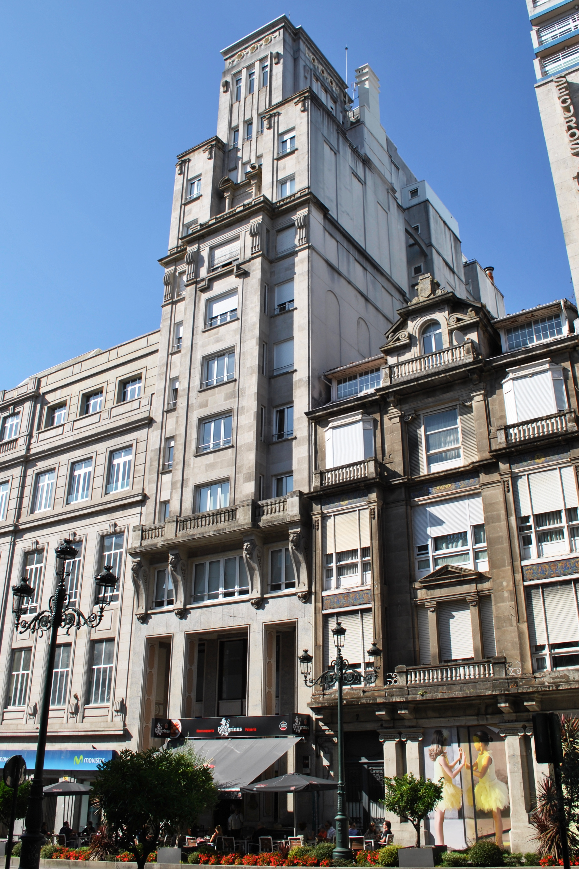 Véxase o título e as categorías.